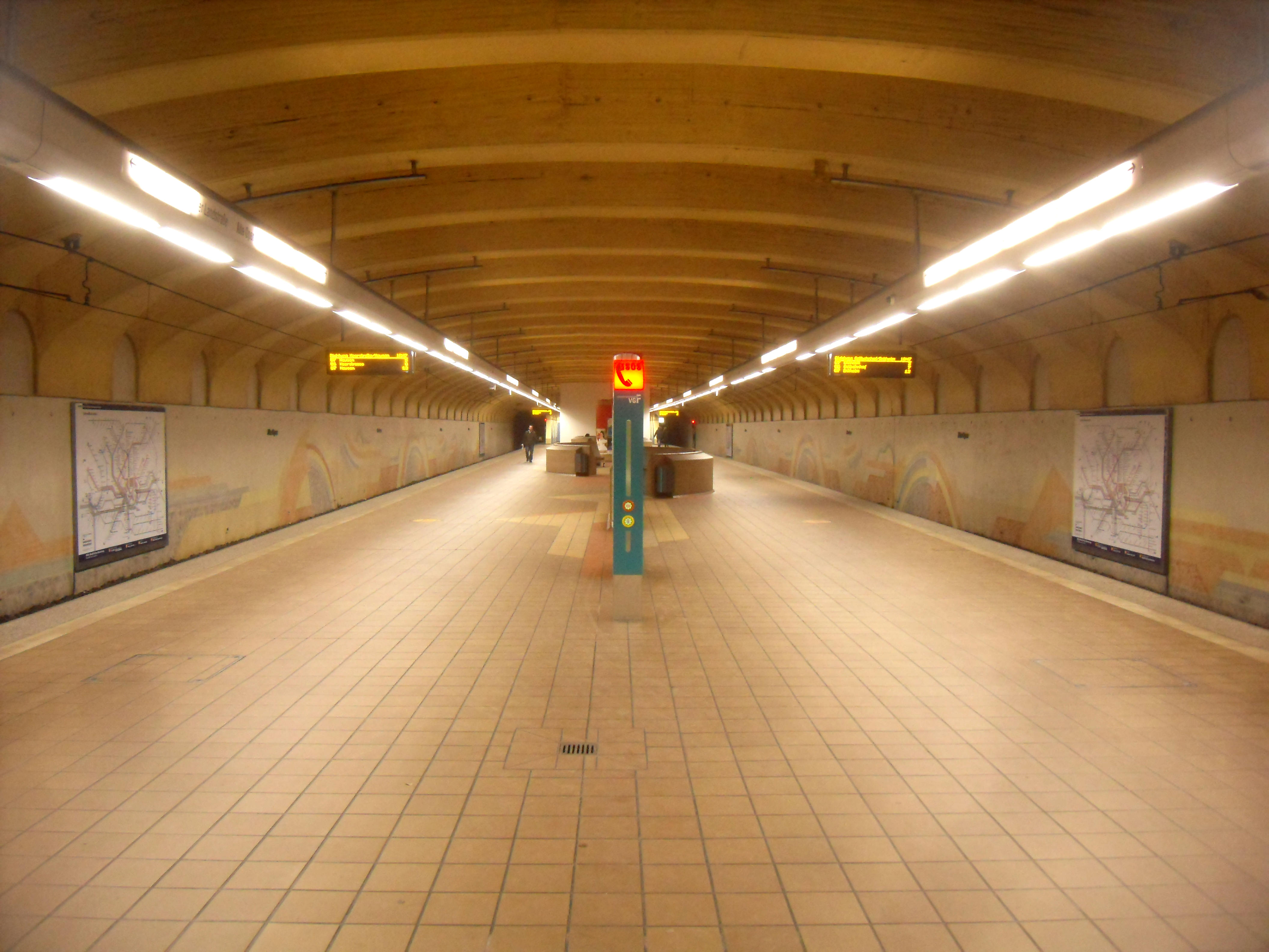 Bahnsteig des U-Bahnhofs Alte Oper (Richtung Enkheim) der U-Bahn Frankfurt auf den Linien U 6/U 7 in Hessen (Deutschland)